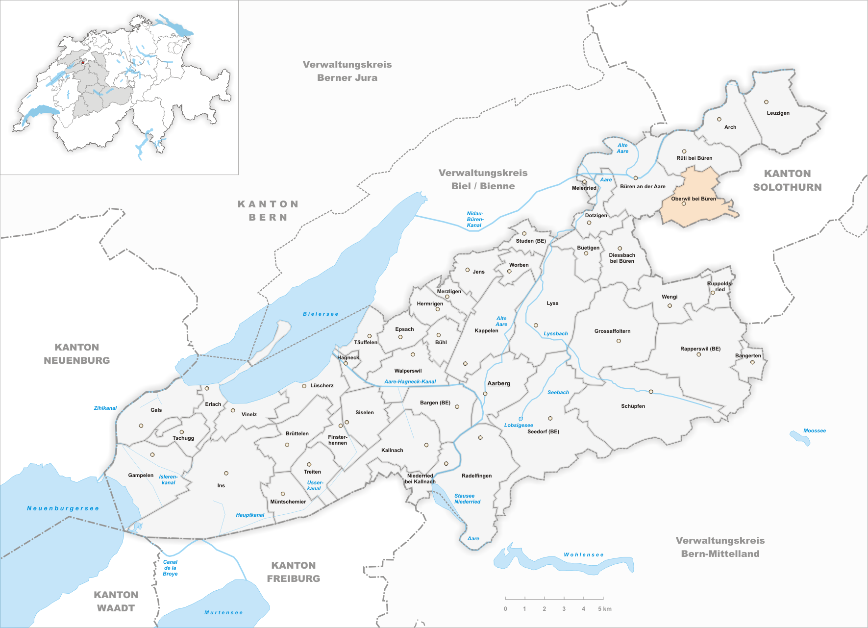 Municipality Oberwil bei Büren